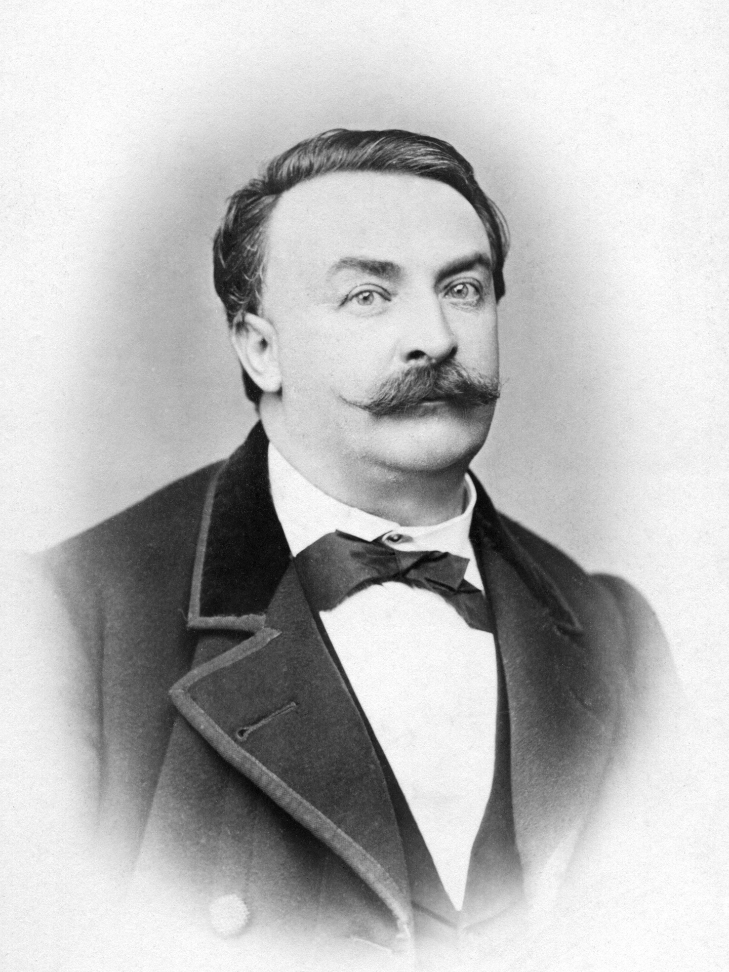 Portrait von Caspar Melchior Balthasar Zeitlinger, Foto von A. Red Linz